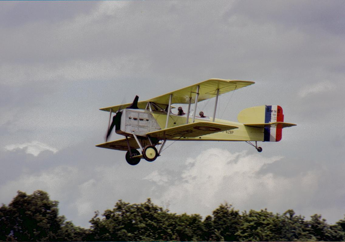 Bréguet XIV au décollage à La Ferté Alais 1994 (moteur hispano)